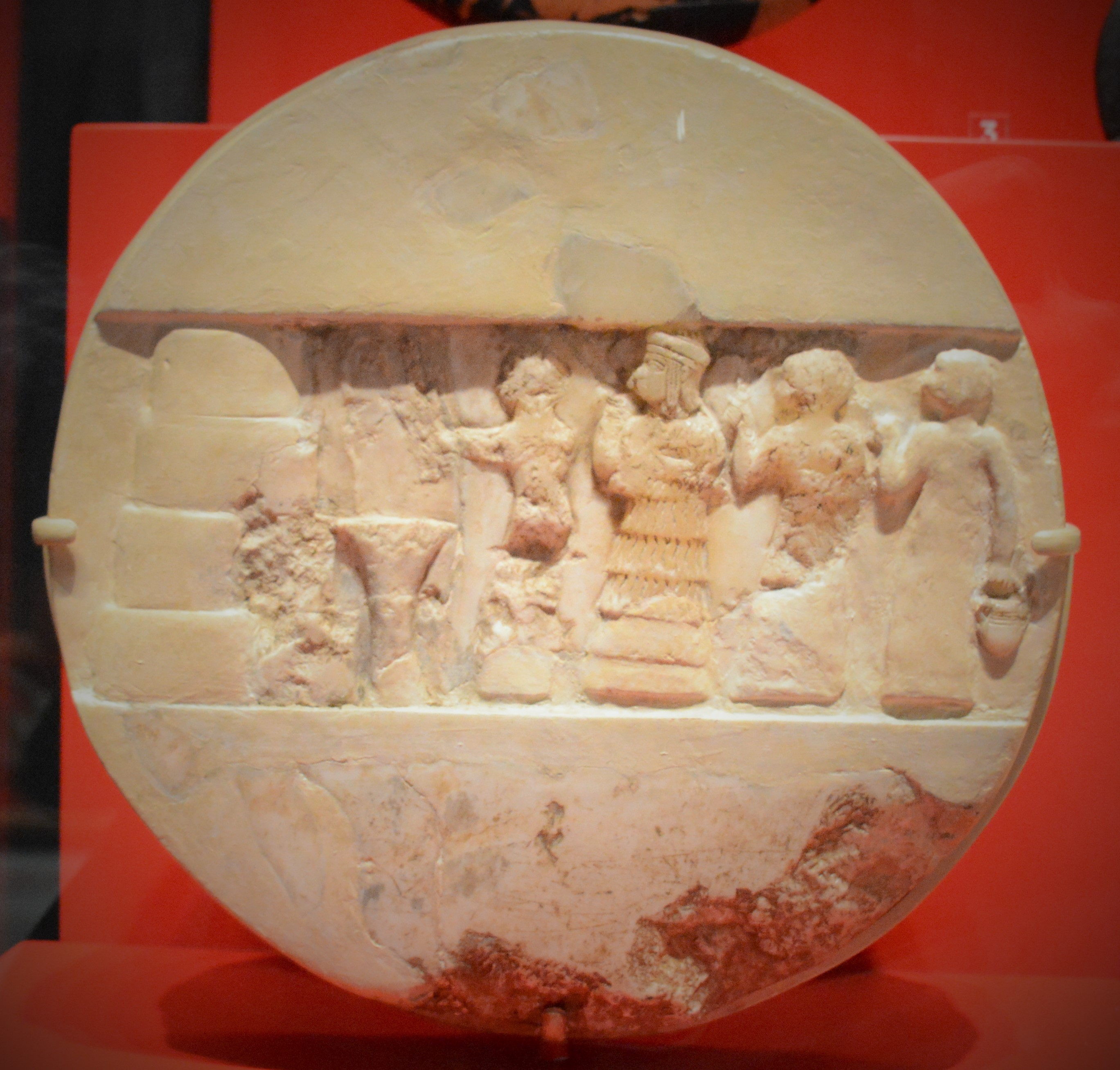 Disque d'Enheduanna. Albâtre, v. 2350-2300 av. J.-C. Ur. Diamètre : 25.6 cm, épaisseur : 7.1 cm. Description du bas-relief : scène rituelle, un prêtre fait une libation devant un autel à quatre étages (à gauche), accompagné de trois personnes, dont la prêtresse Enheduanna en posture de prière (troisième personne en venant de la droite).